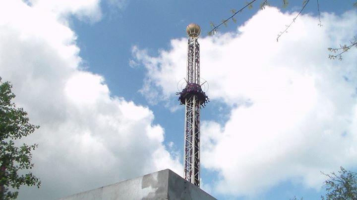 La Flash Tower du Parc du Bocasse